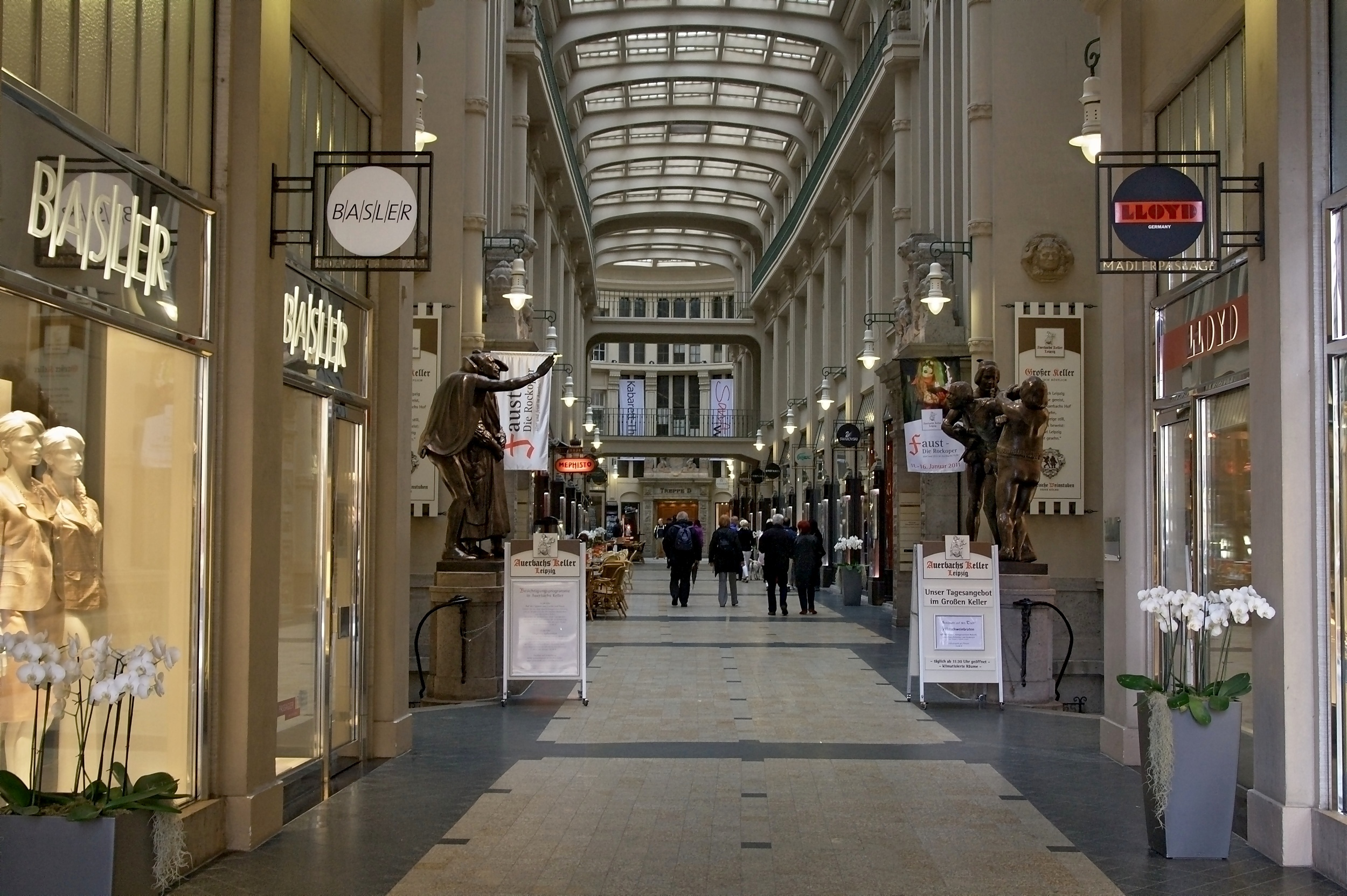 Innenansicht der Mädlerpassage von der Grimmaischen Straße aus - Leipzig, 2010. Fehler im Dateinamen!